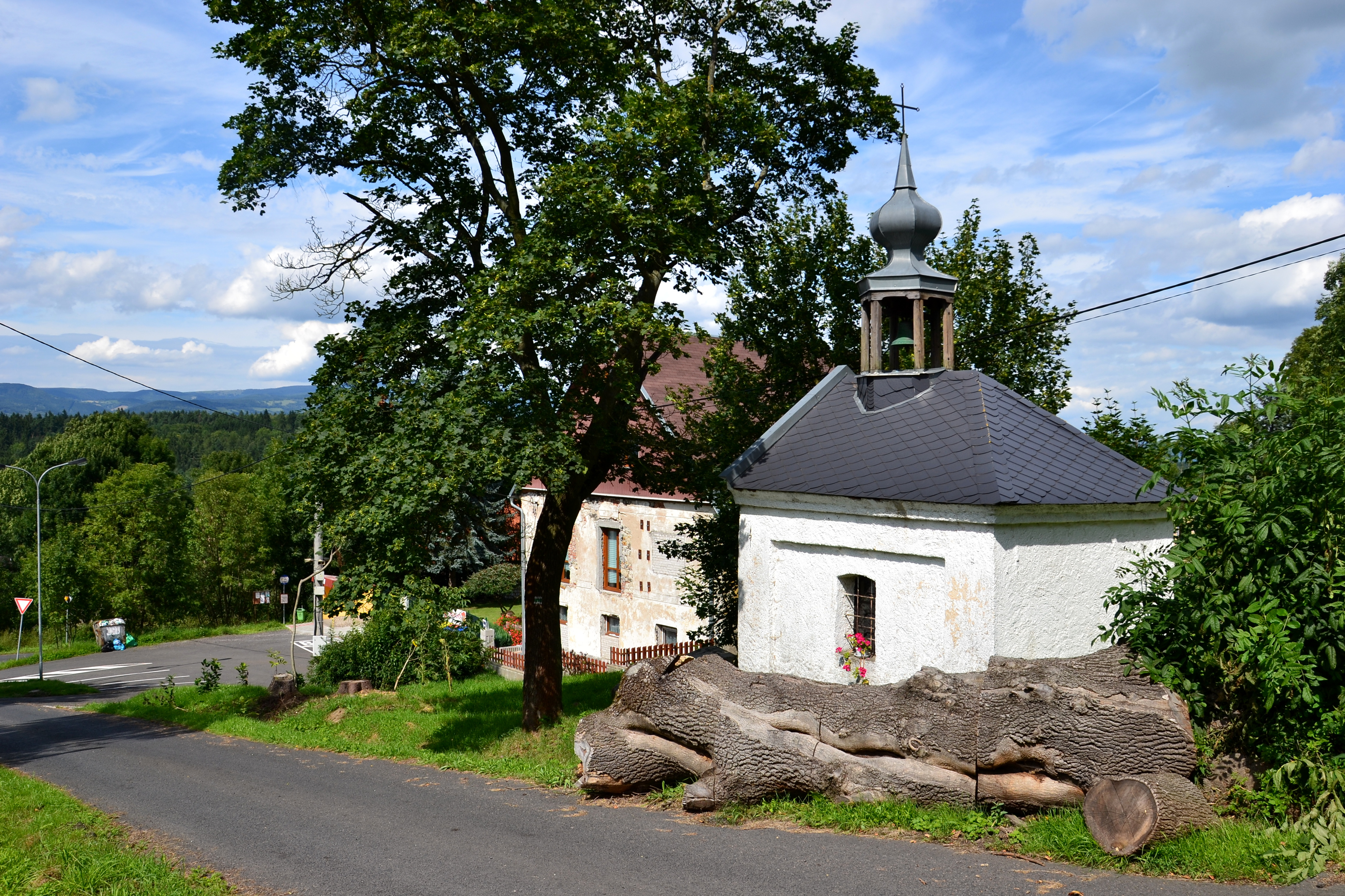 Kaple